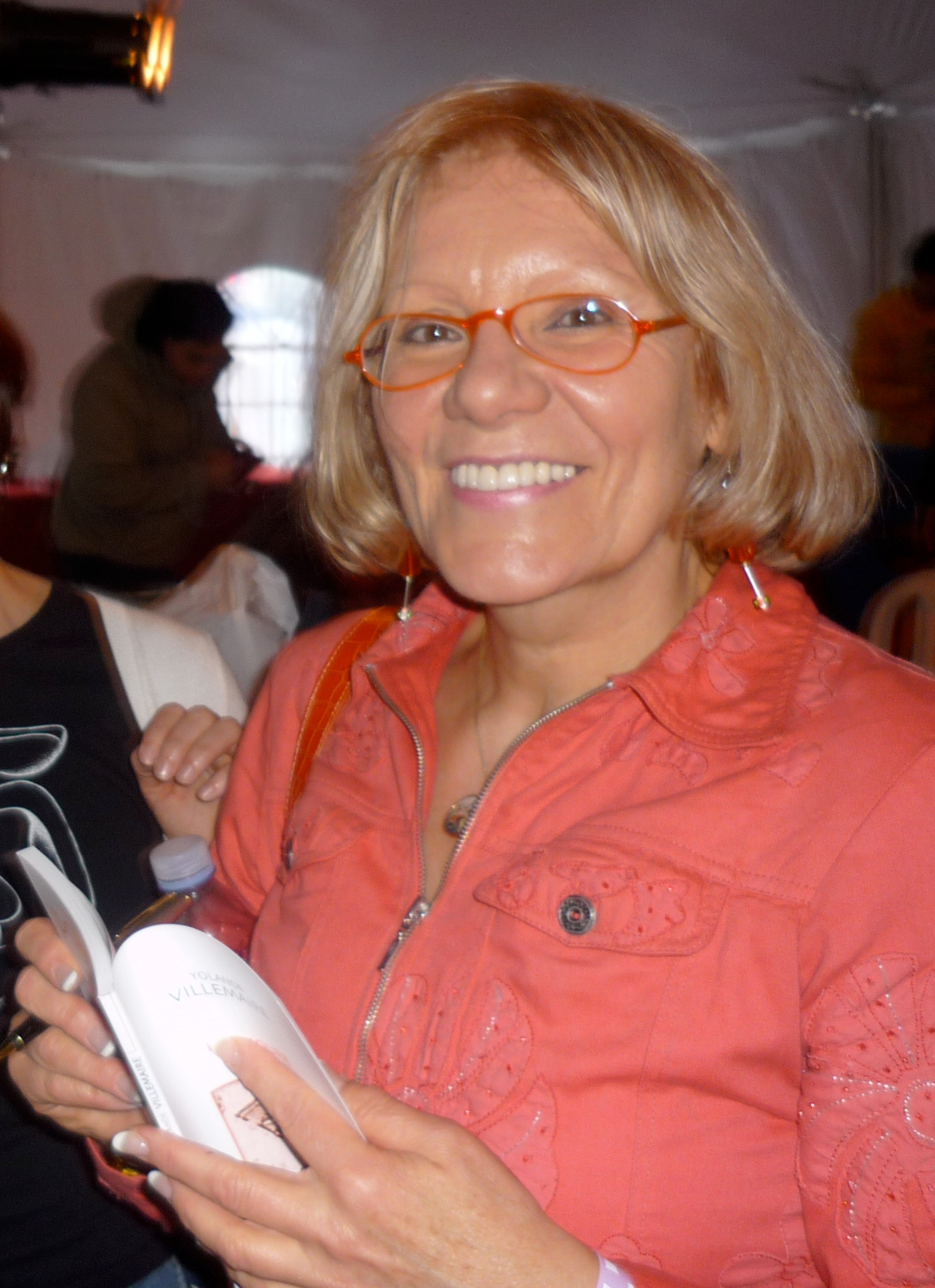 Yolande Villemaire au Marché de la Poésie de Montréal 2009